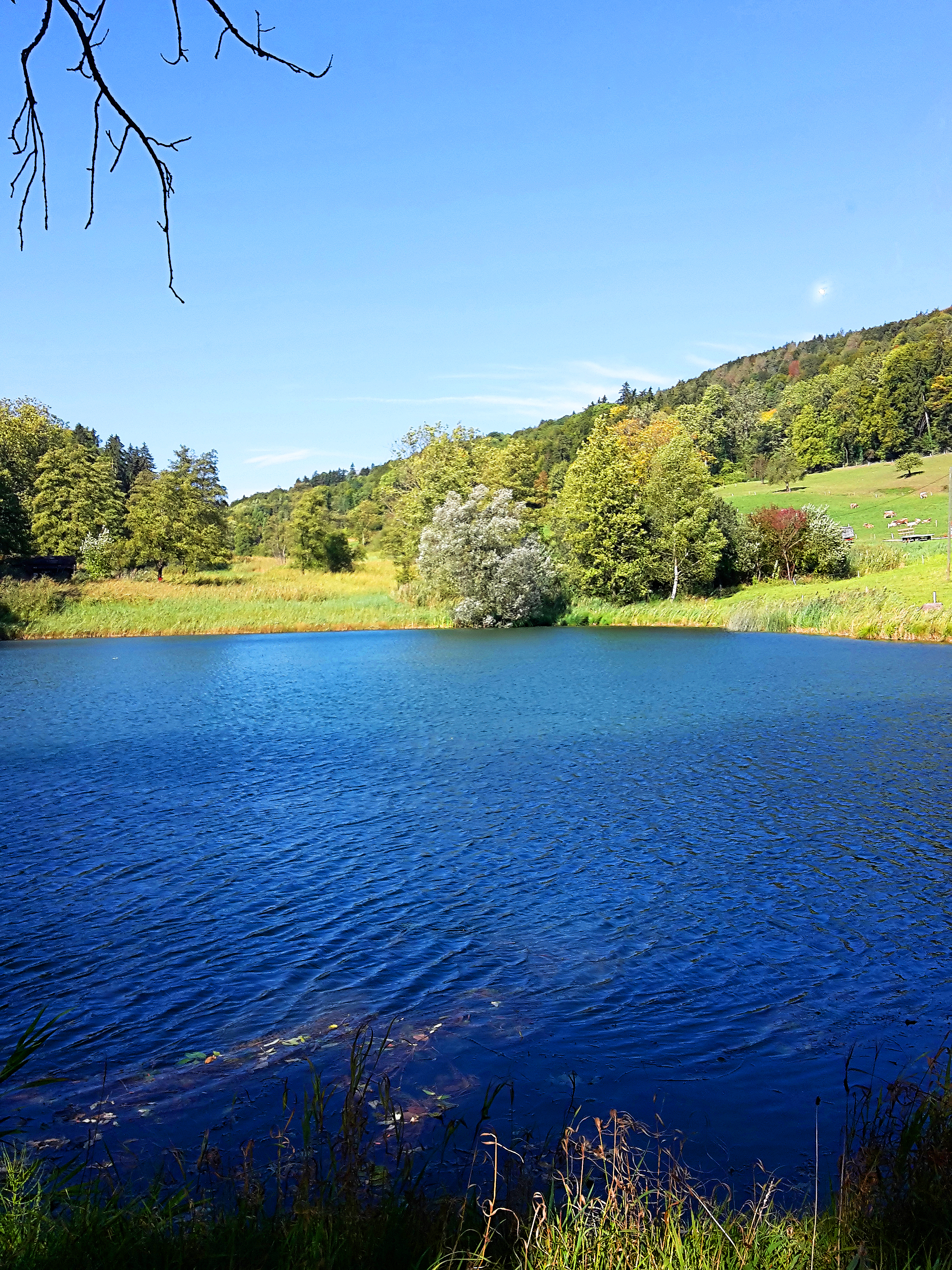 Grosser Weiher in Weiningen